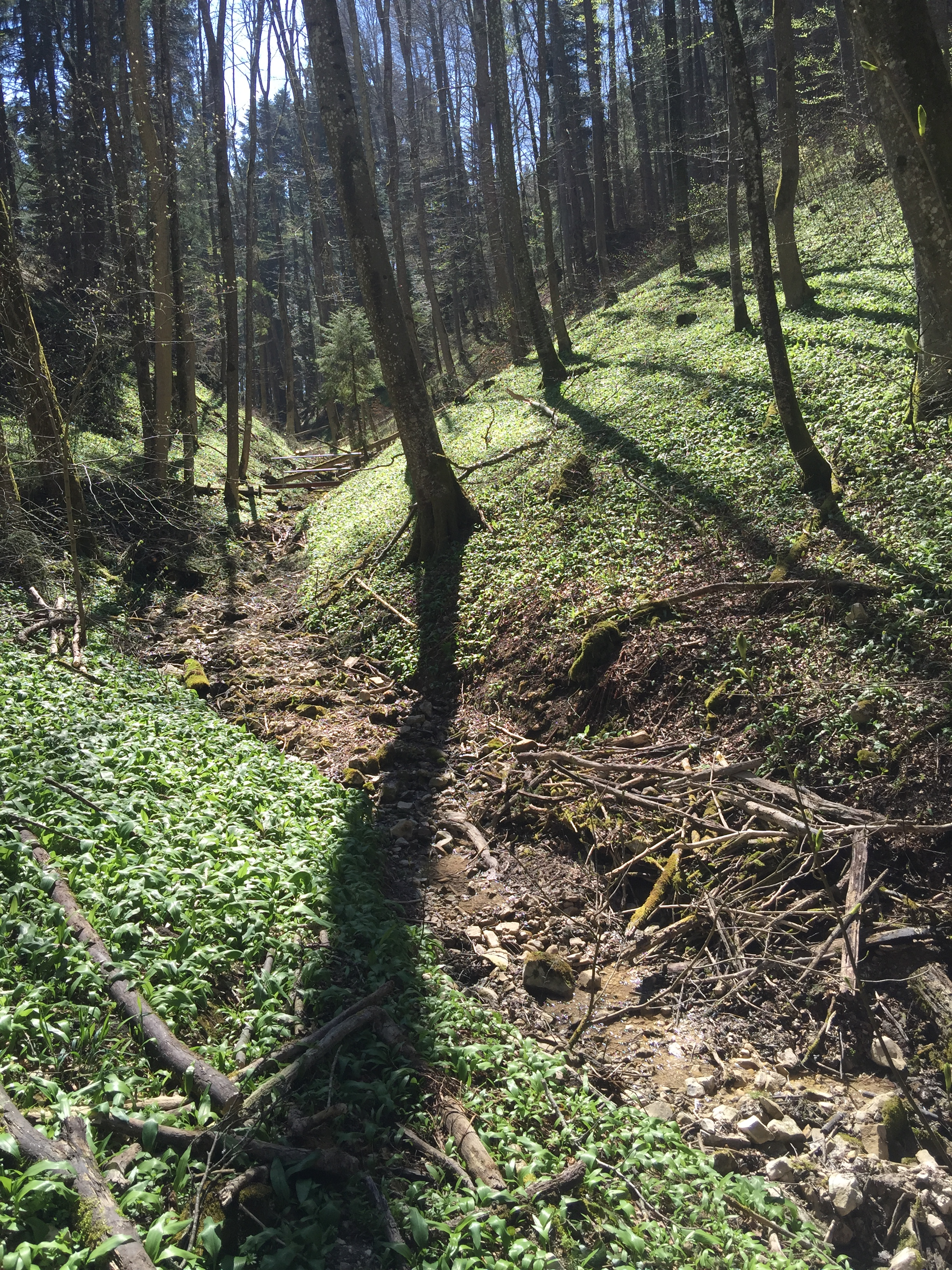 Klingenbach, Oberlauf am Albtrauf